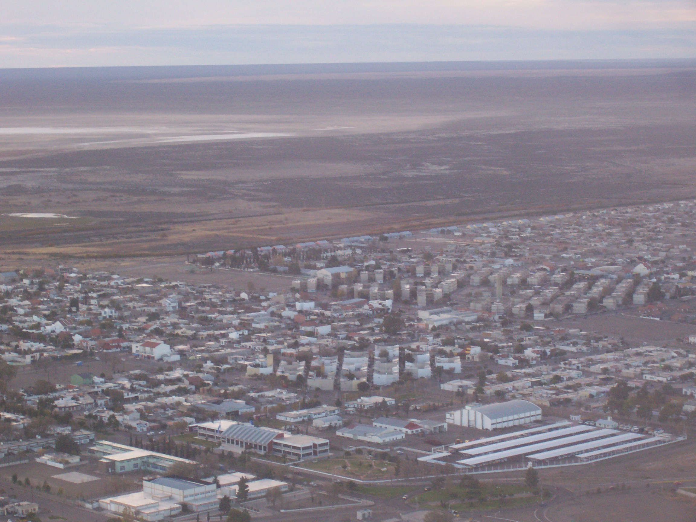 Imagen aerea de la ciudad de Rawson,Chubut